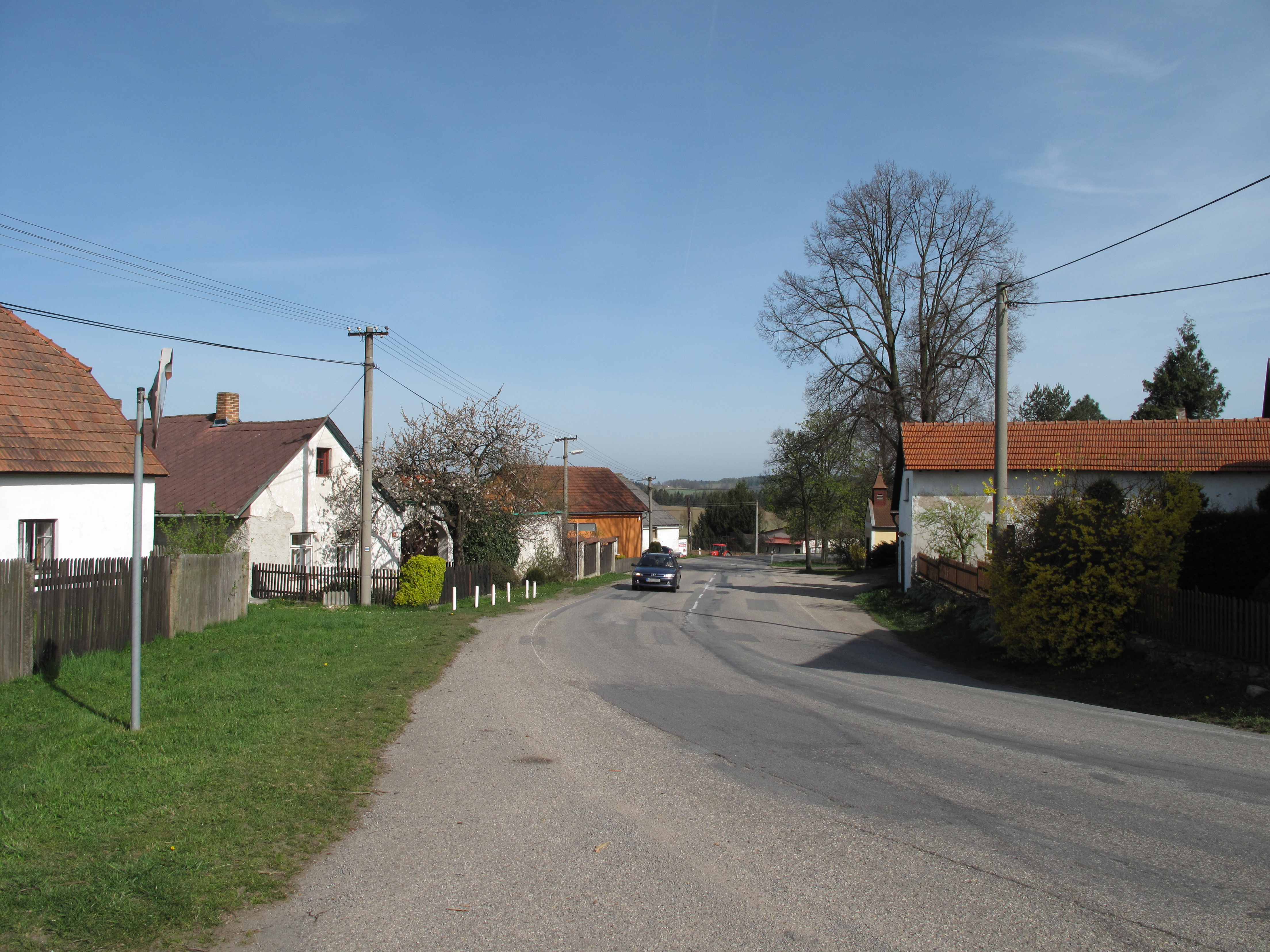 Silnice v Sedlišti. Okres Pelhřimov, Česká republika.